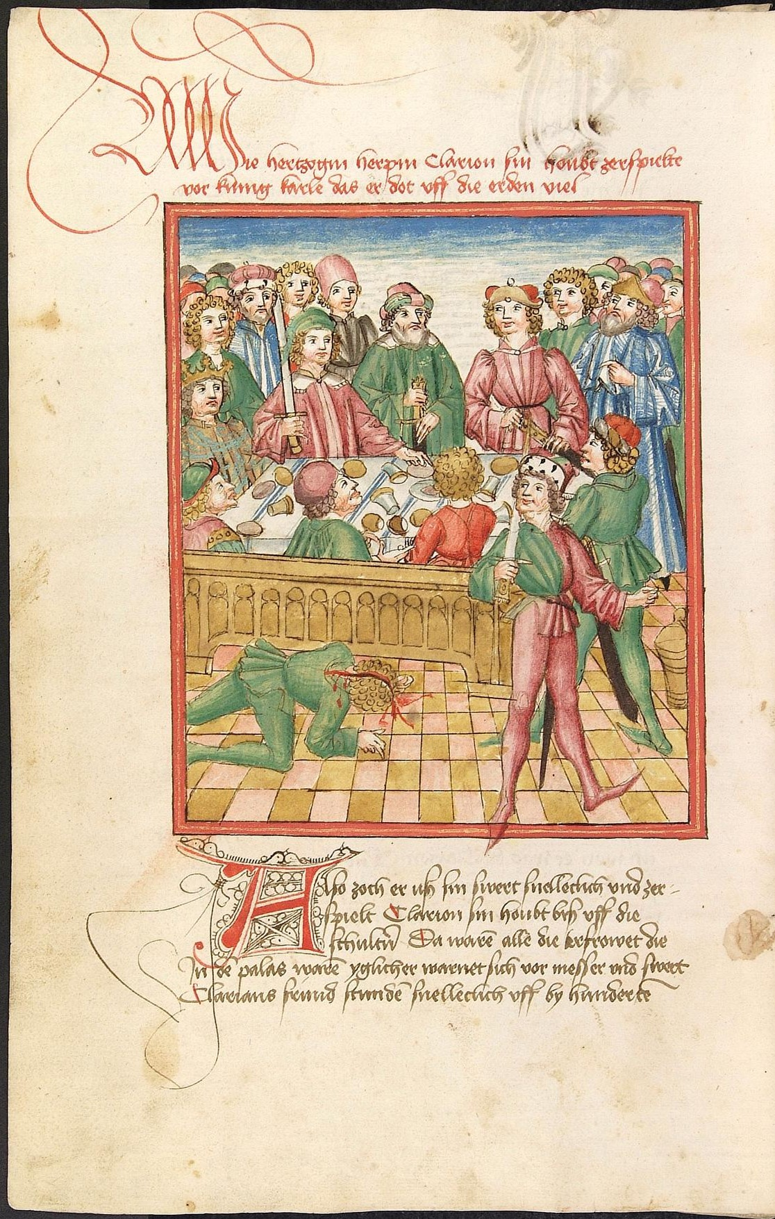 Codex Palatinus germanicus 152, Blatt 2v - Herpin - Hoftag König Karls (Karl der Große), Herzog Herpin von Bourges steht mit erhobenem Dolch triumphierend neben dem mit gespaltenem Haupt zu Boden gestürzten Leichnam des verleumderischen Clarion. Die Tisch-Gesellschaft König Karls befindet sich angesichts der verübten Blutrache in Aufruhr.